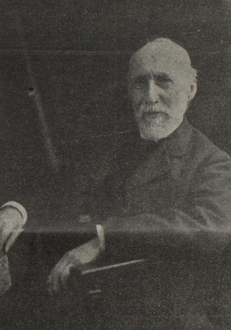 Porträt-Foto von Julius Emmerich